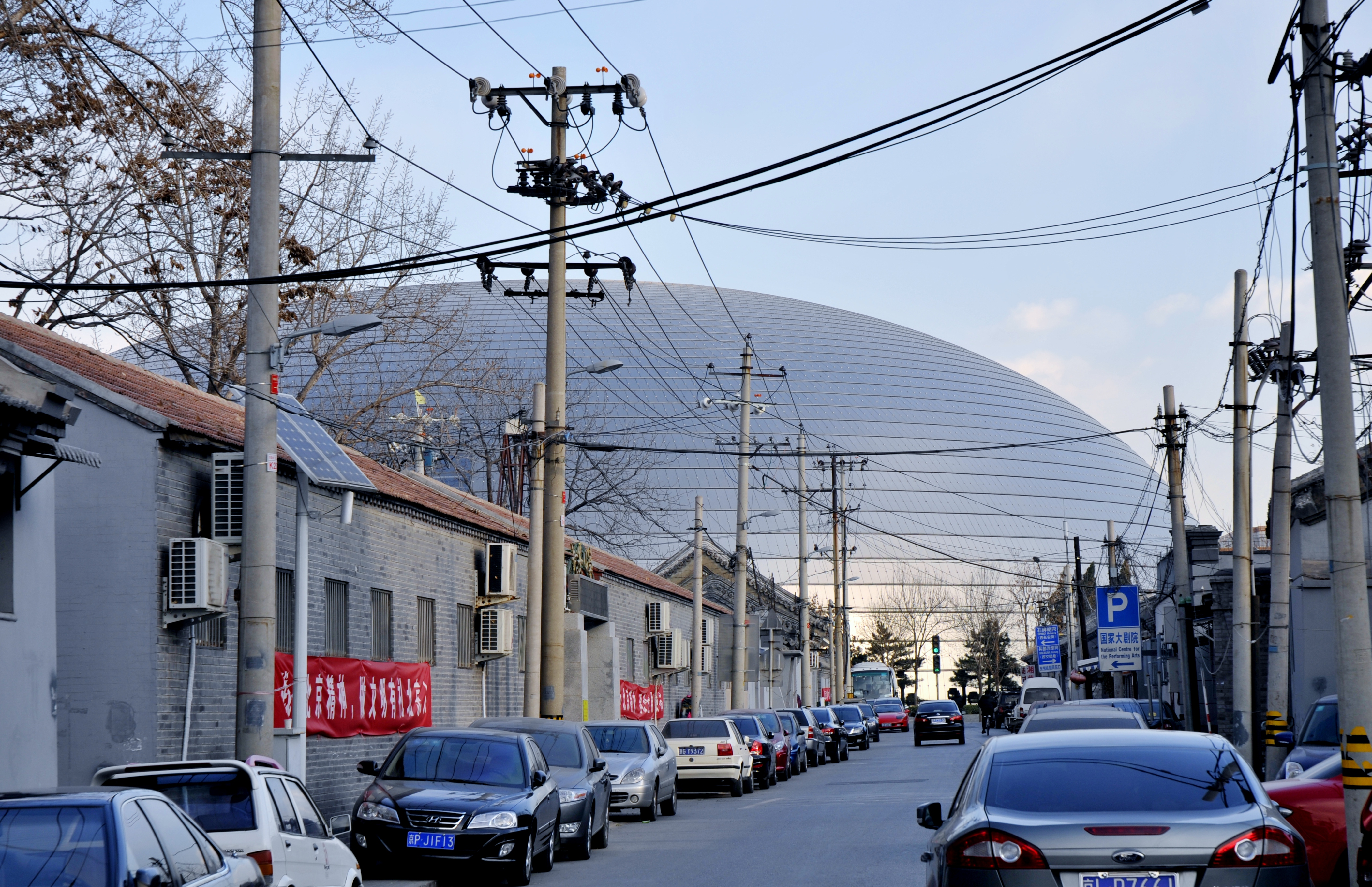 从东绒线胡同看国家大剧院